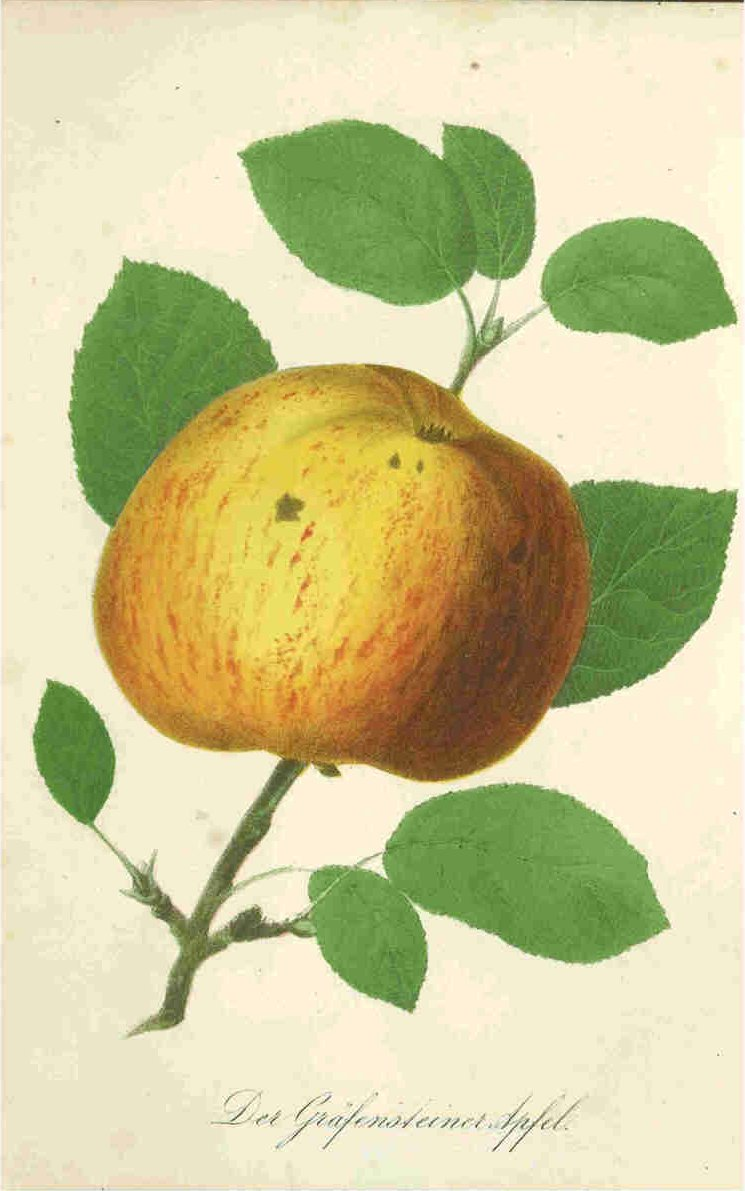 Zeichnung der Sorte Grafensteiner